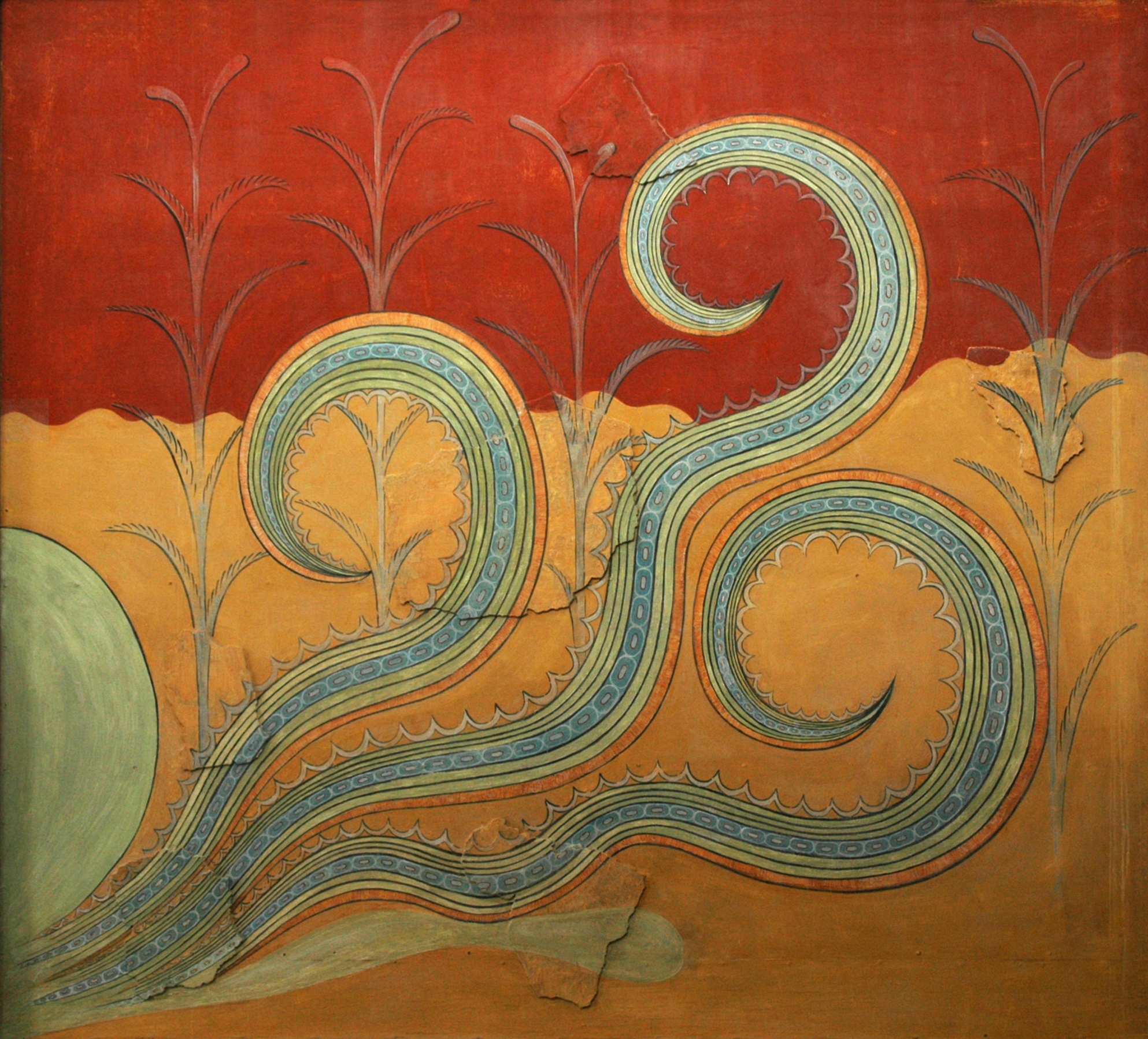 Fresco del palacio de Cnosos.